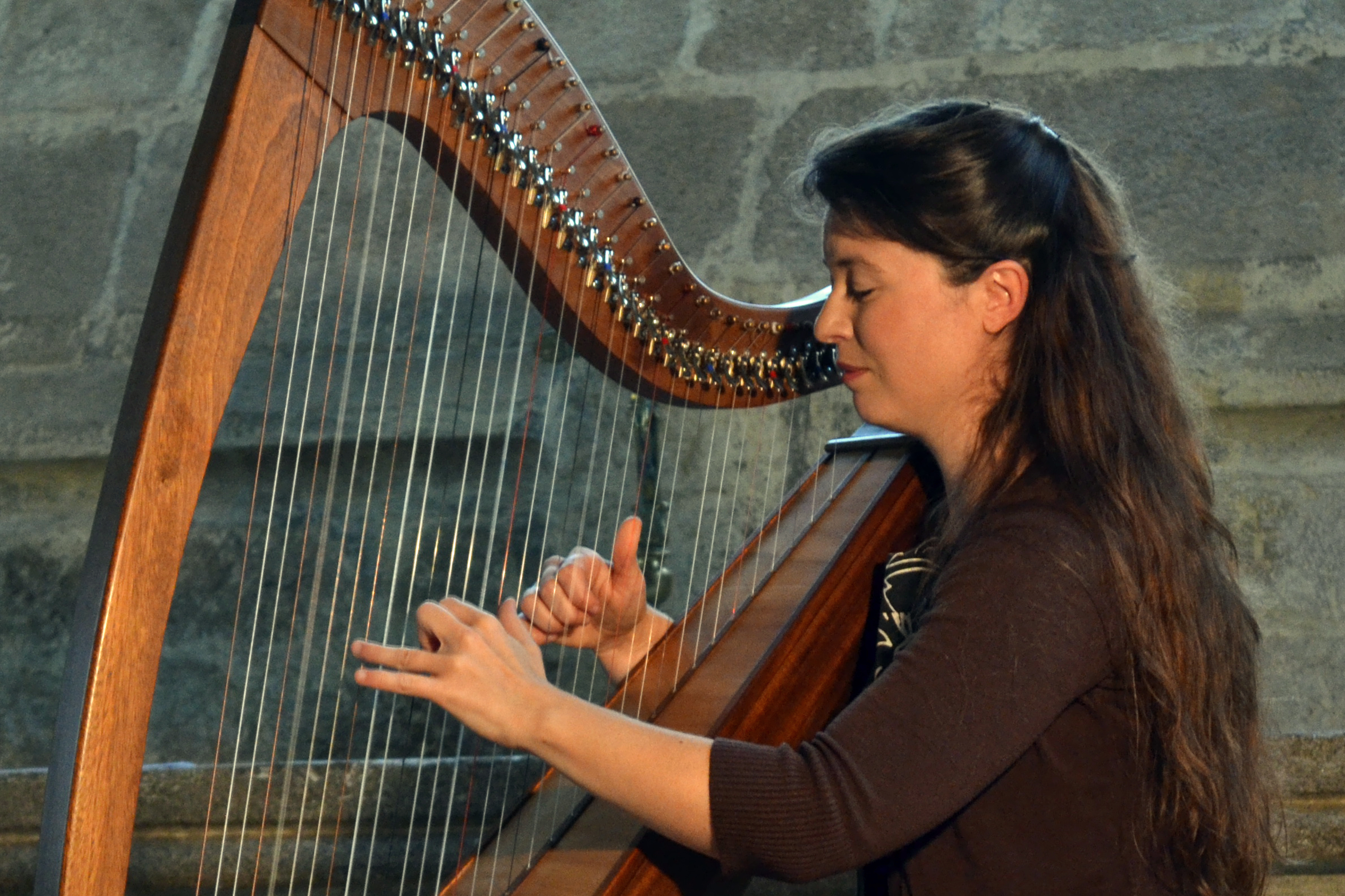 Récital de harpe celtique par Nolwenn Arzel dans la chapelle de Tronoën à Saint-Jean Trolimon.